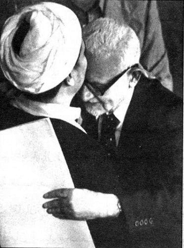 دکتر یدالله سحابی رییس سنی اولین دوره مجلس شورا پست ریاست را به هاشمی رفسنجانی، رییس منتخب تحویل می دهد